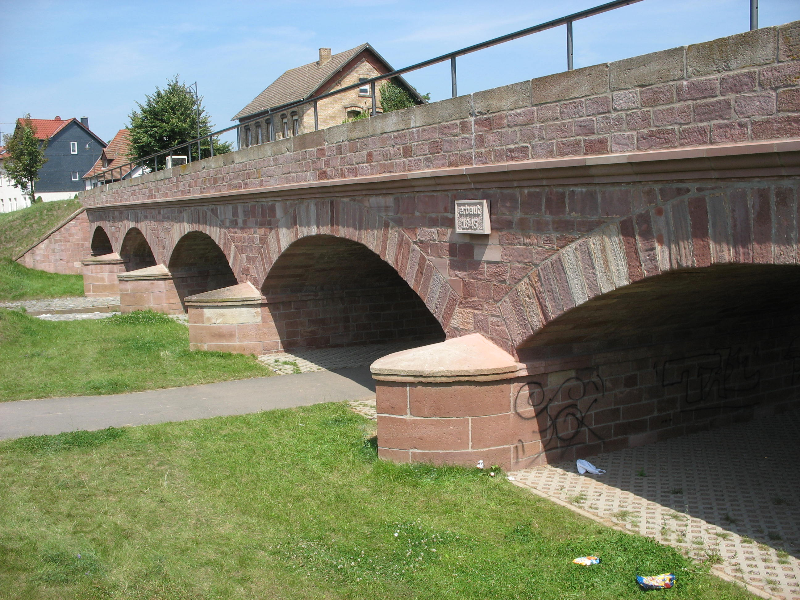 Kelbra (Kyffhäuser) – Die Solgrabenbrücke bzw. Fünfbogenbrücke, erbaut 1845, saniert 2006–2008This is a photograph of an architectural monument. 84683